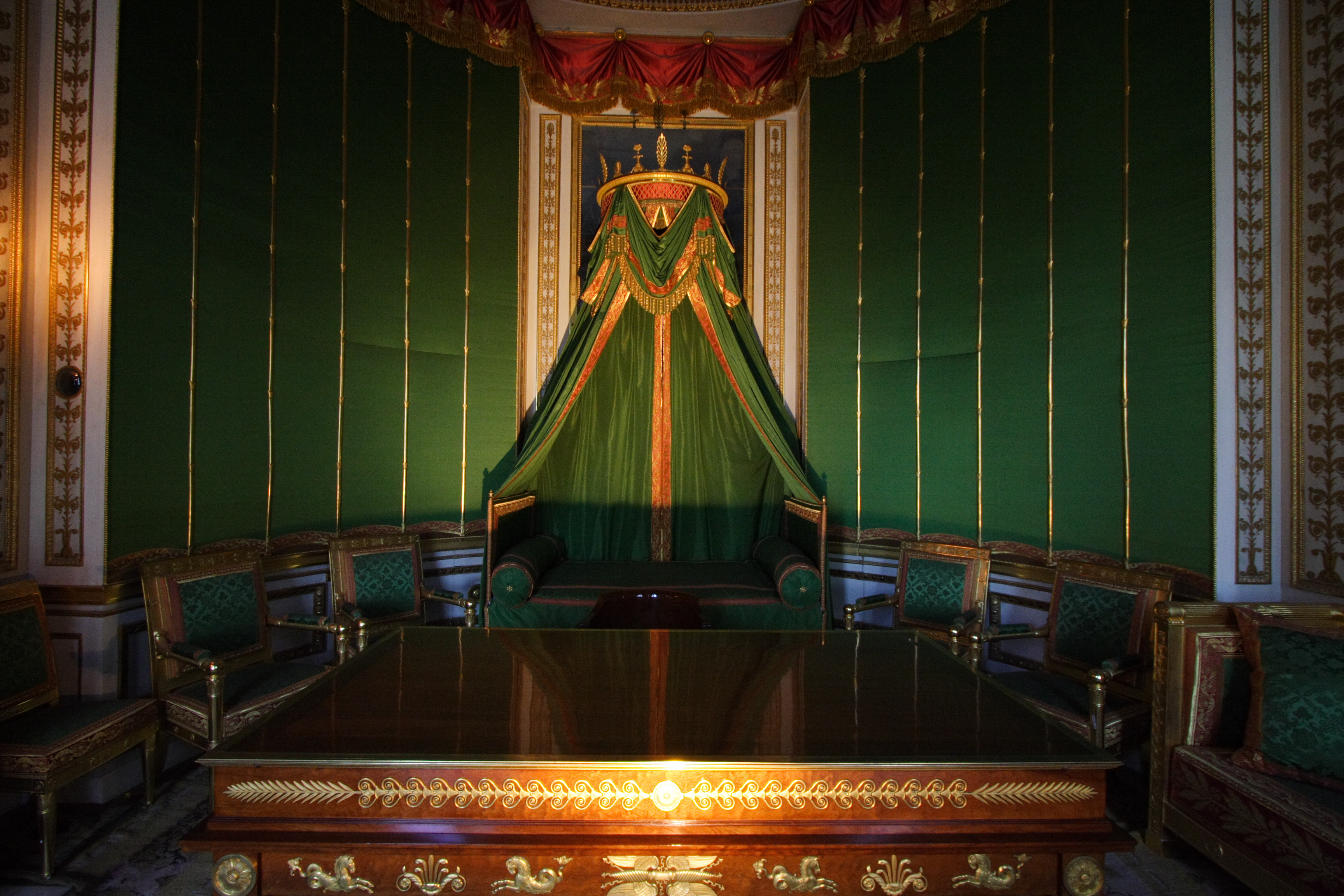 Kleines Schlafzimmer Napoleons I. im Schloss Fontainebleau